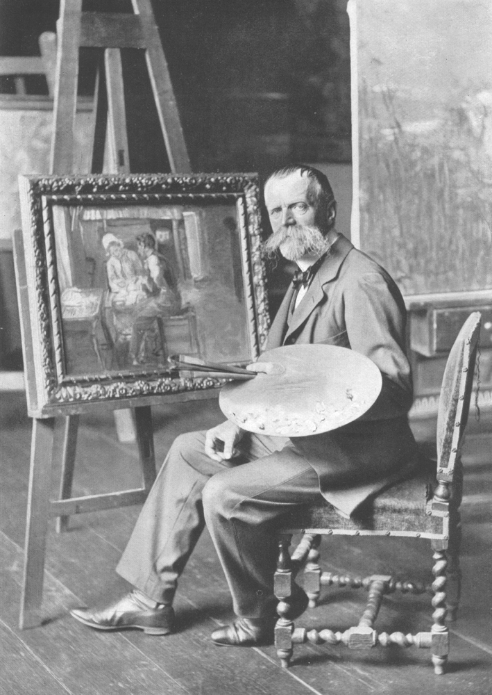 Der deutsche Maler Fritz von Uhde (1848-1911) im Jahr 1902.